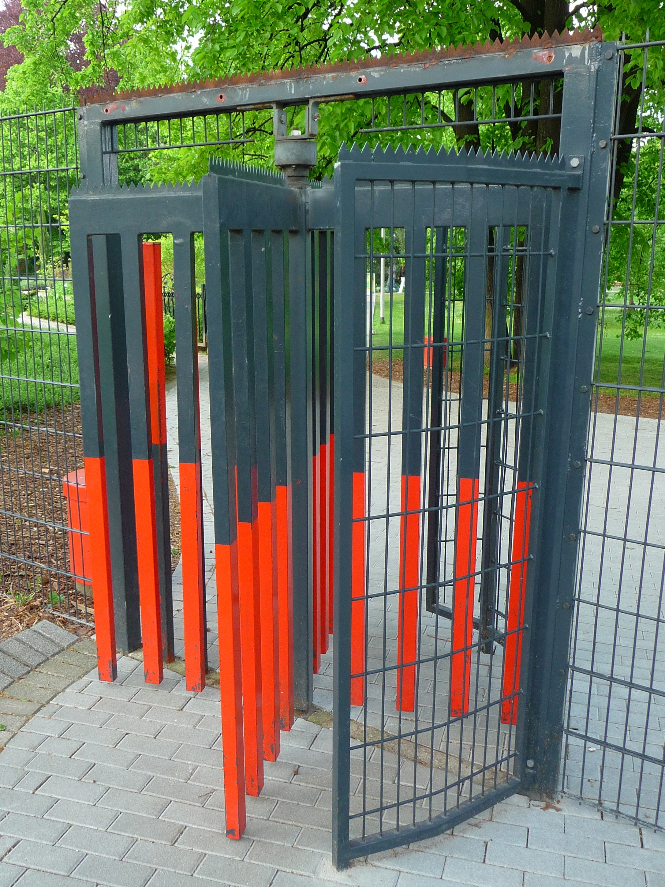 Drehkreuz an einem Ausgang des Luisenparks in Mannheim (Baden-Württemberg, Deutschland)